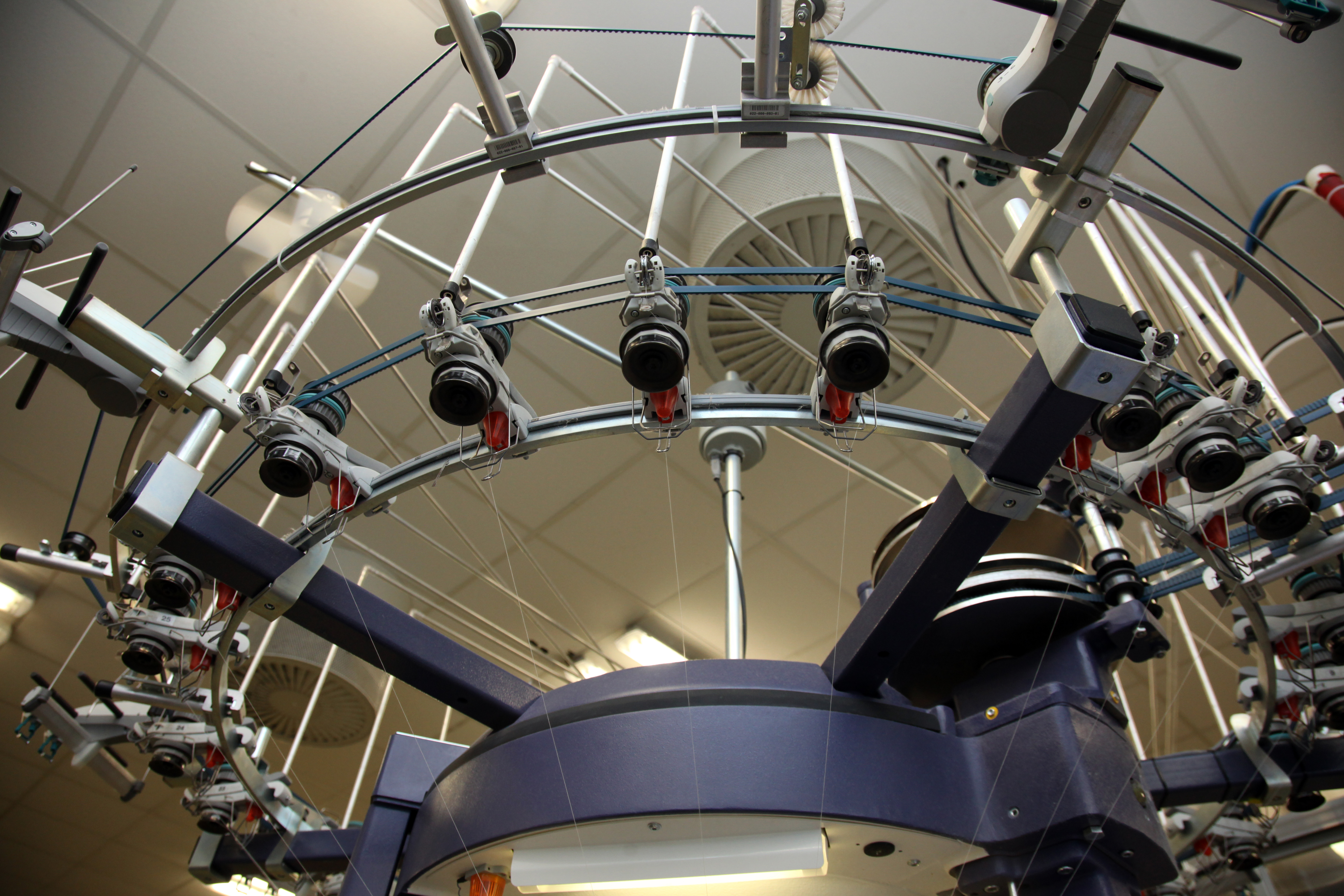 Pletaci_stroj